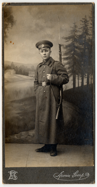 MuuseumikoguFotokoguOlemusfotoOriginaaloriginaalSeisundmääramata legend Ateljeefoto Armin Lomp, Tartus. a) esikülg b) tagaküljel kiri Joh. Pääsuke". ( eesti)